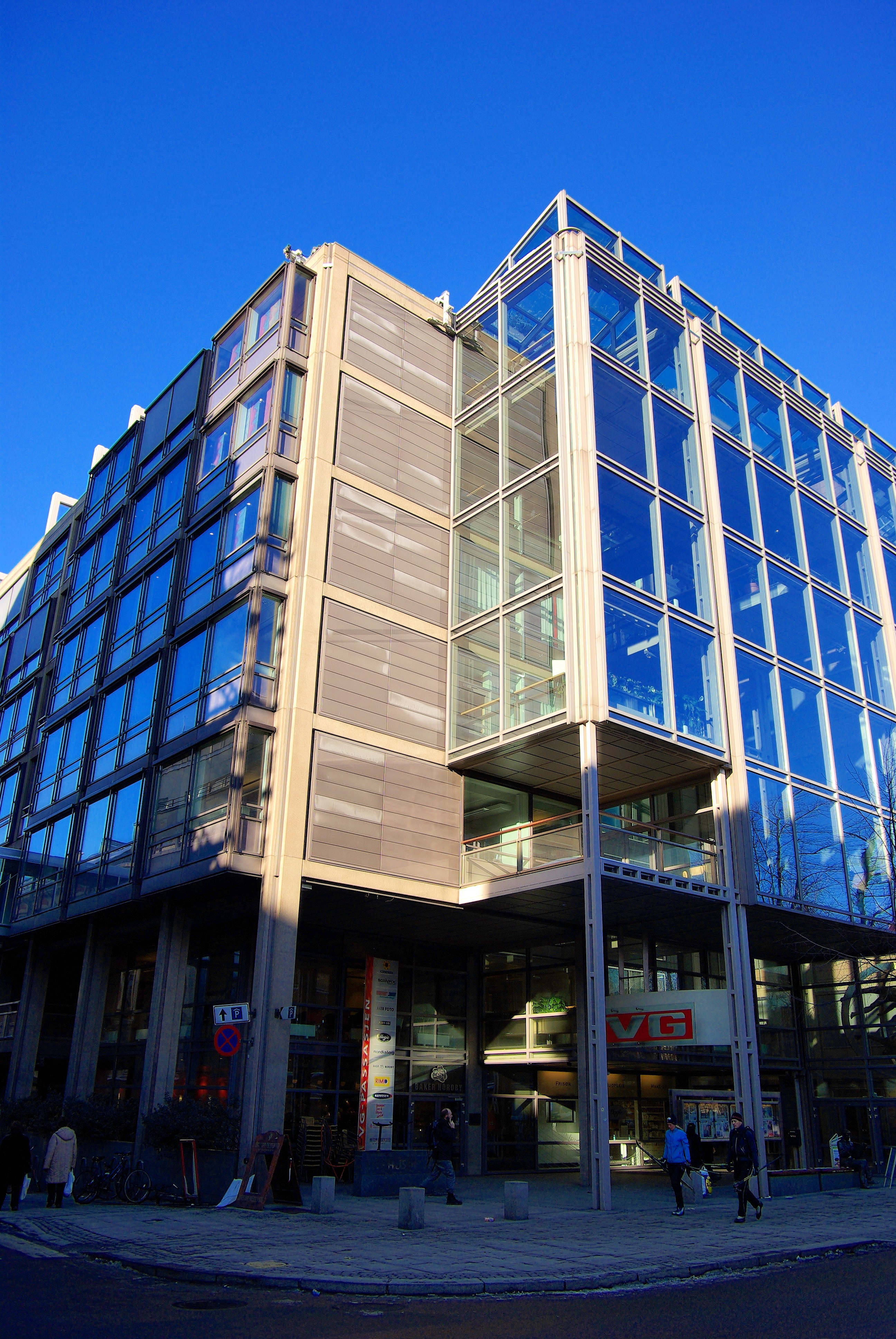 Verdens Gang's headquarter in Akersgata, Oslo, Norway.